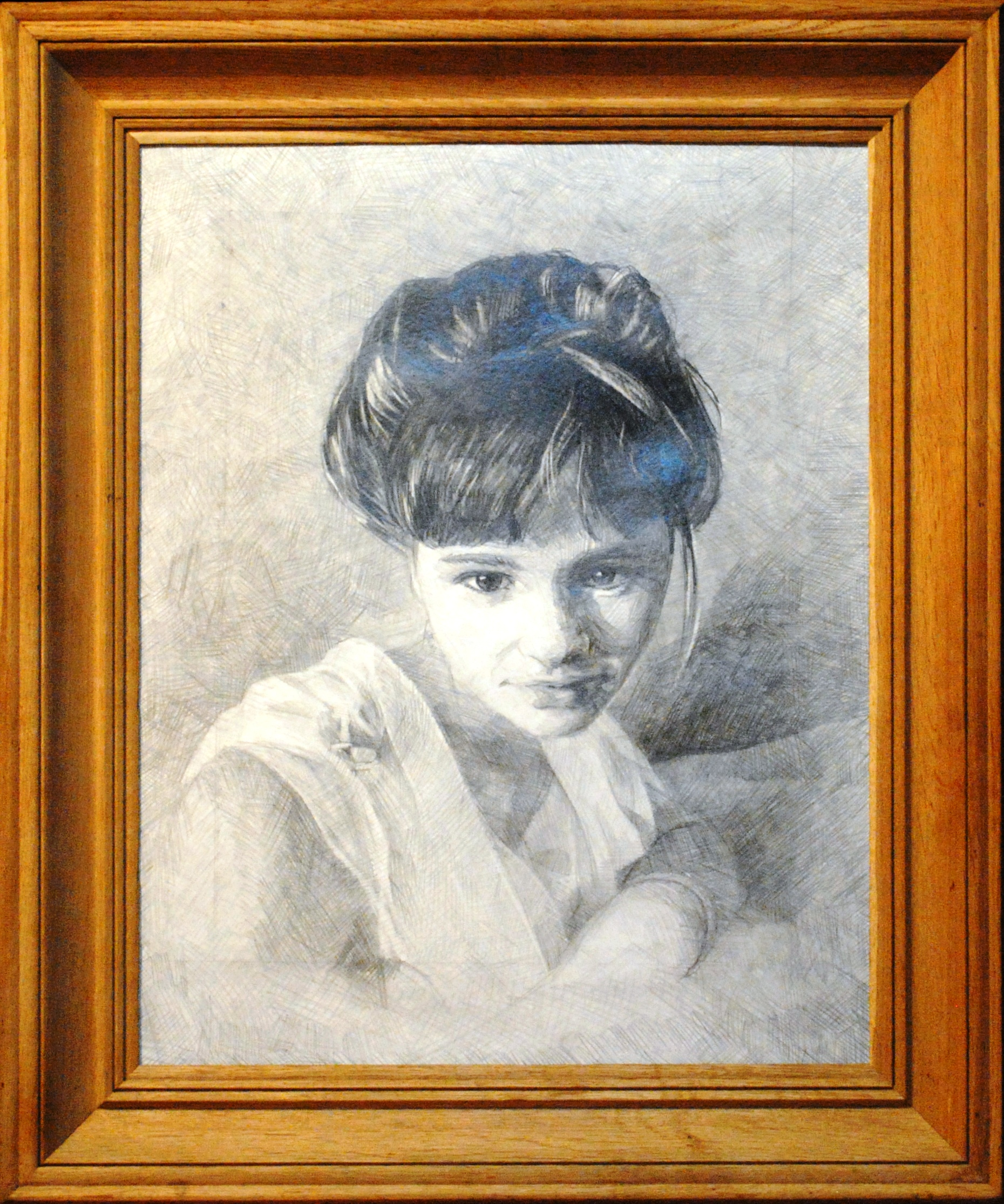 художник Раскат